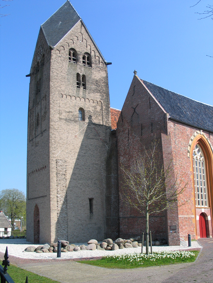 De St. Walfriduskerk in Bedum. Zelf gemaakte foto